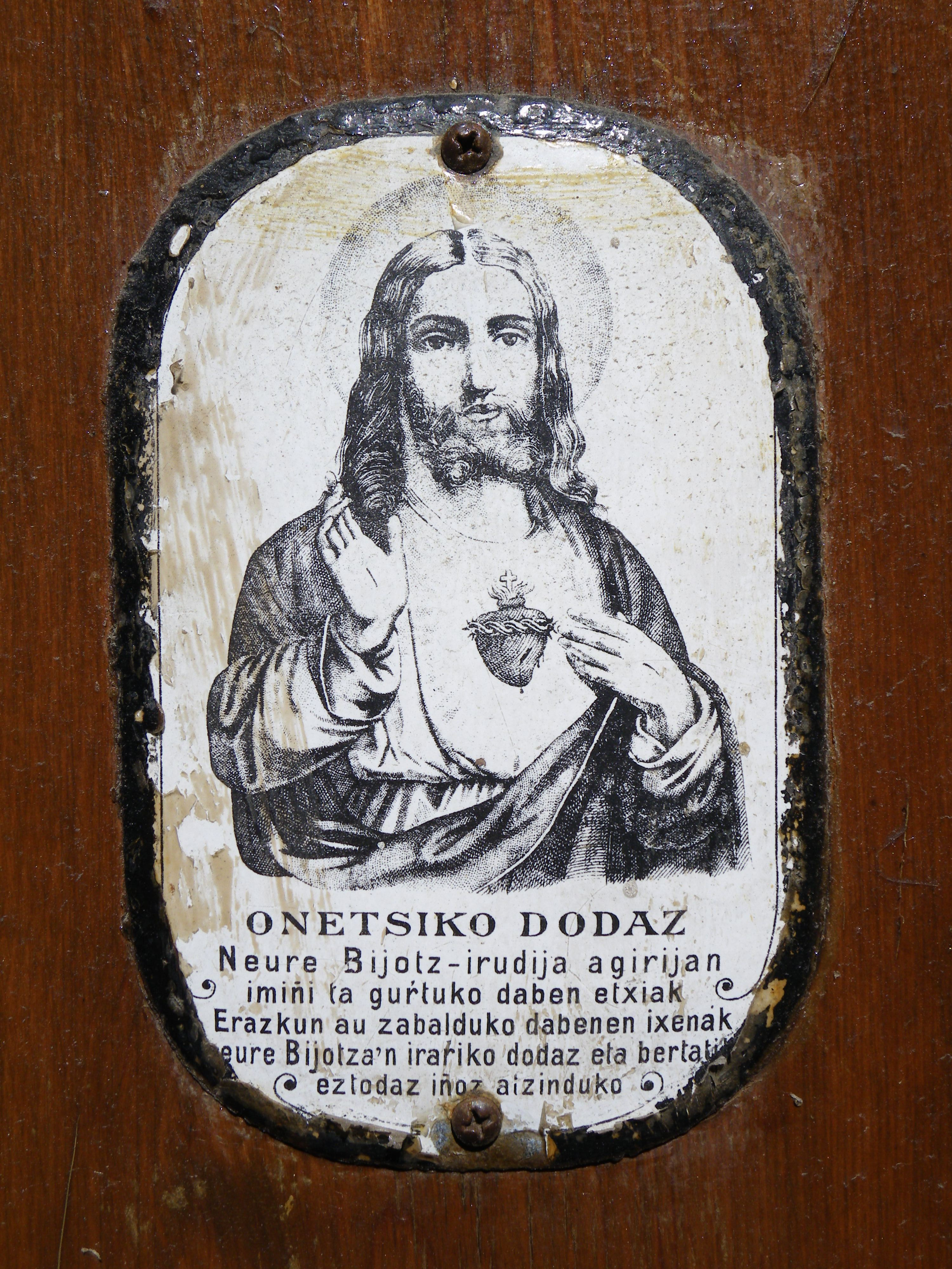 Onetsiko ditut neure Bihotz-irudia agerian ipini eta gurtuko duten etxeak. Atxikimendu hau zabalduko dutenen izenak neure Bihotzean irarriko ditut eta bertatik ez ditut inoiz ezabatuko. Mendebaldeko euskaraz: Onetsiko dodaz neure Bijotz-irudija agirijan imiñi ta gurtuko daben etxiak. Erazkun au zabalduko dabenen ixenak neure Bijotzan irarriko dodaz eta bertatik eztodaz iñoz atzinduko.